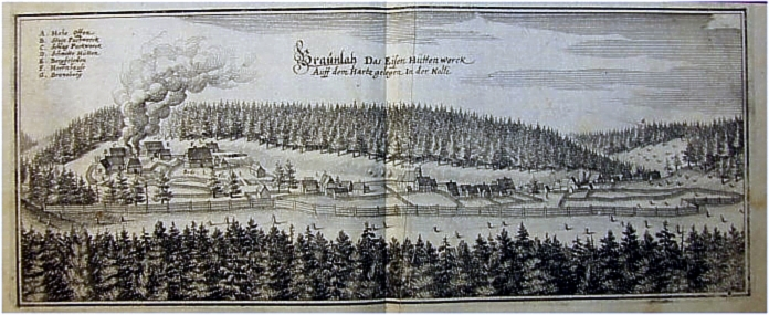 Eisenhüttenwerk Braunlage